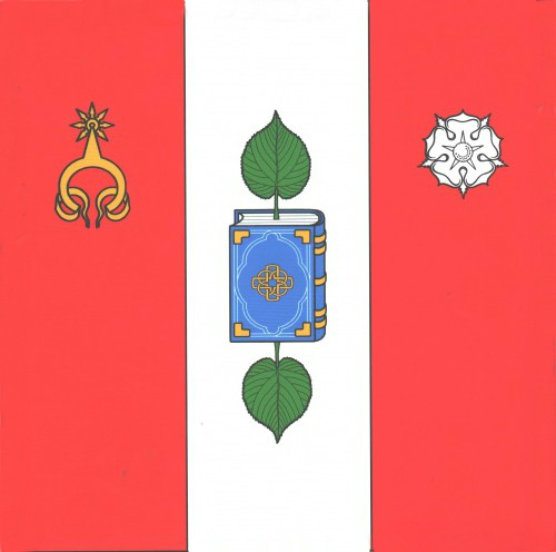 Drapelul satului Larga